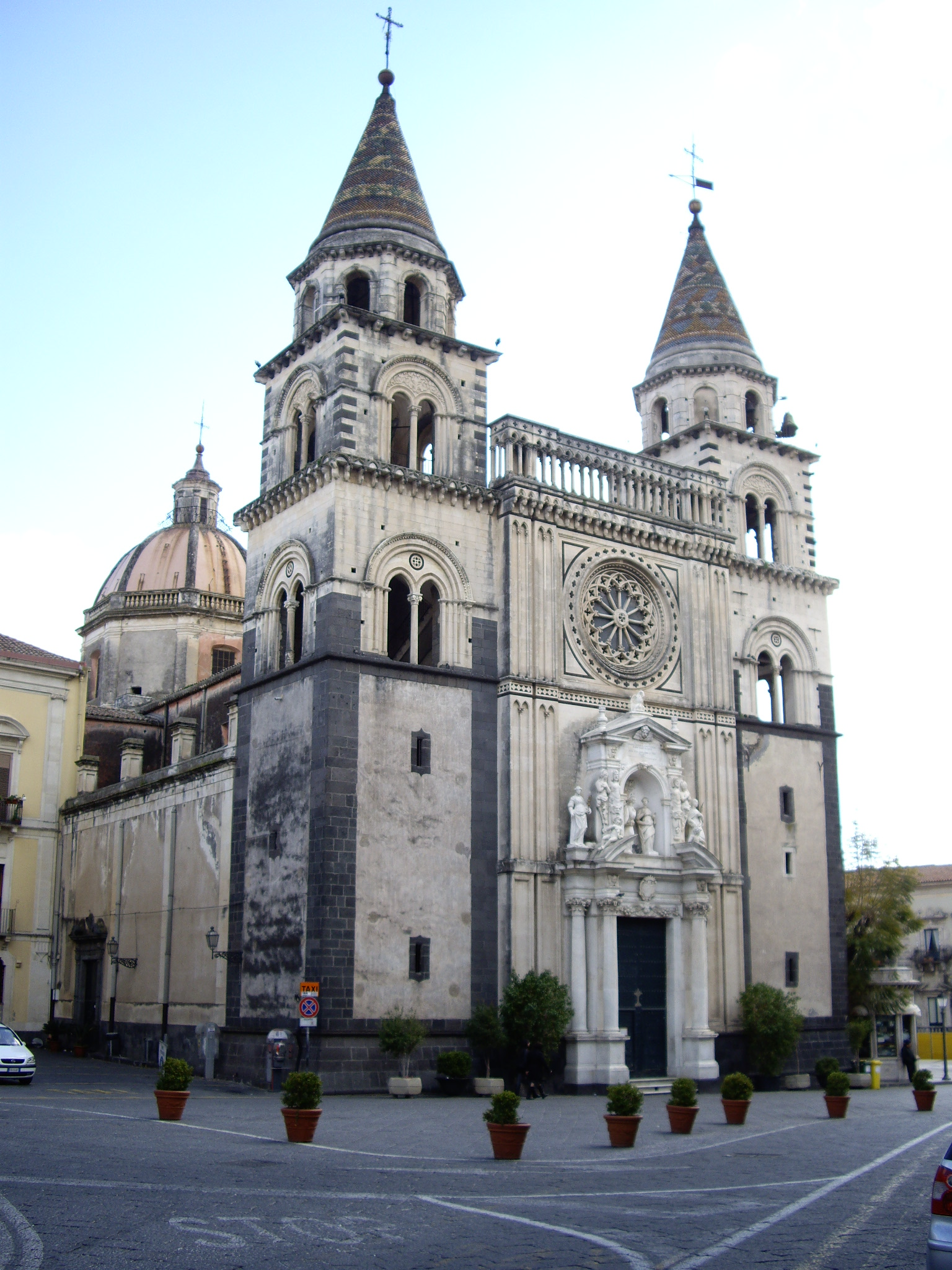 Acireale: Catedrale (Duomo)